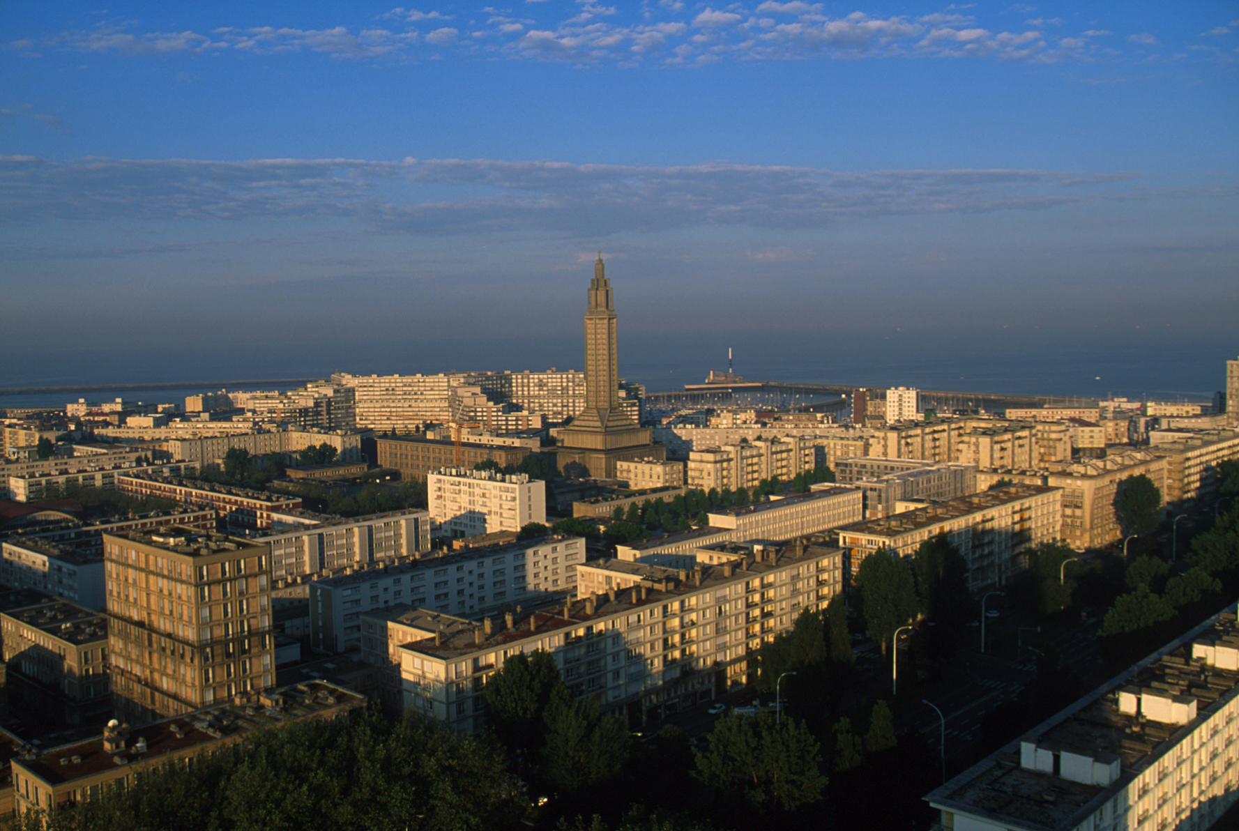 Photo aérienne du centre ville du Havre.